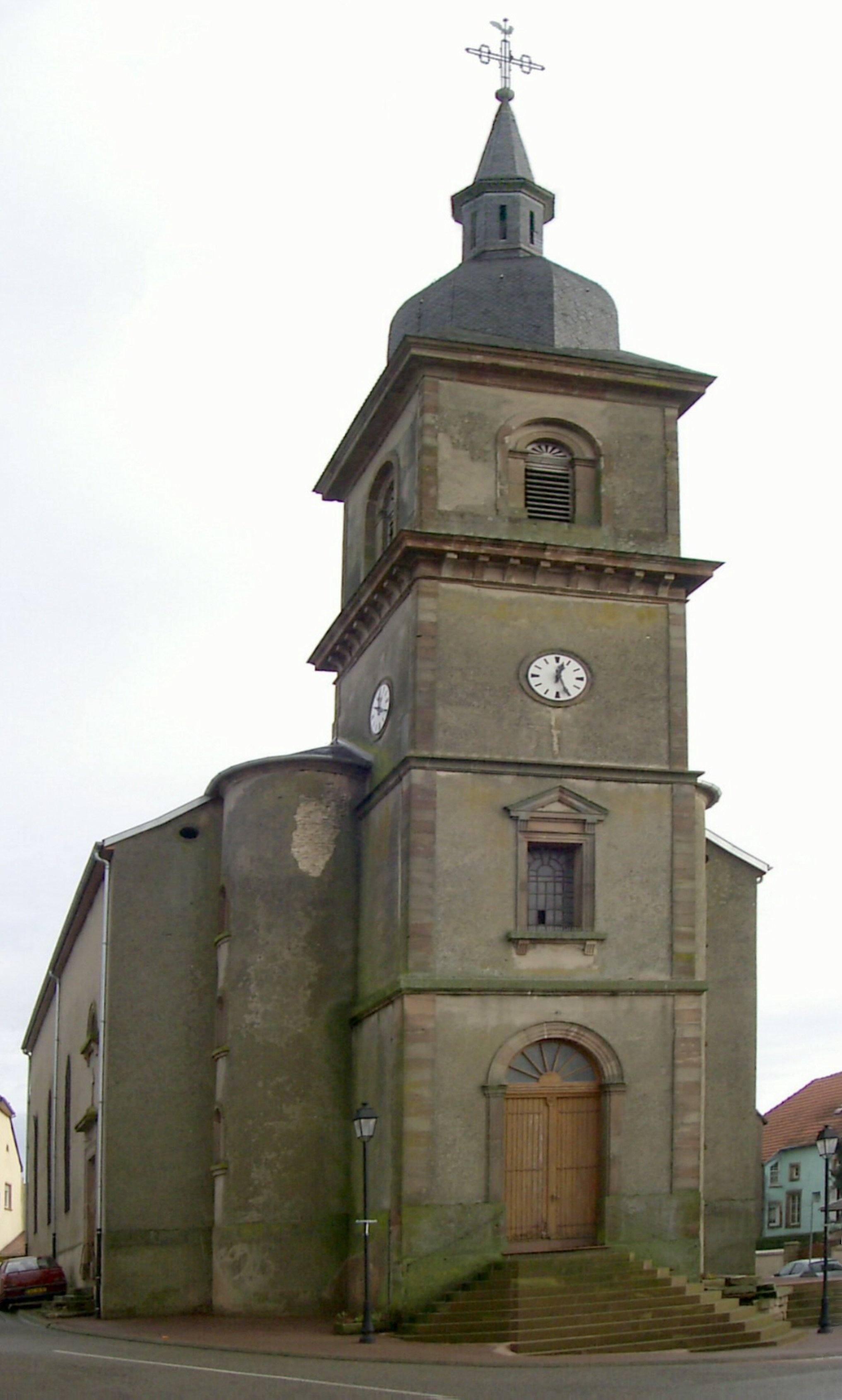 L'église Saint-Adelphe d'Albestroff